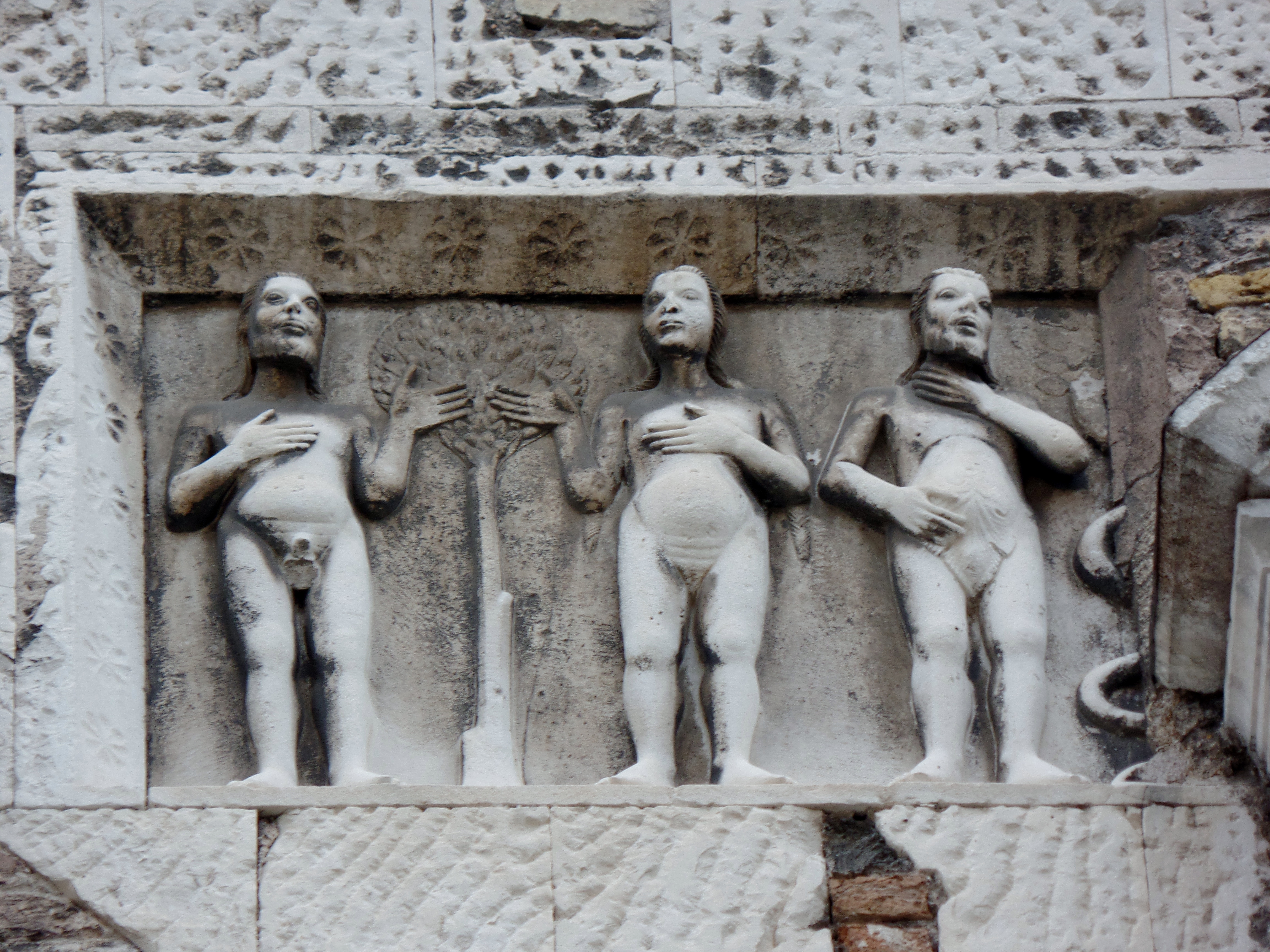 Palazzo degli Anziani Ancona incisione facciata sinistra This is a photo of a monument which is part of cultural heritage of Italy.